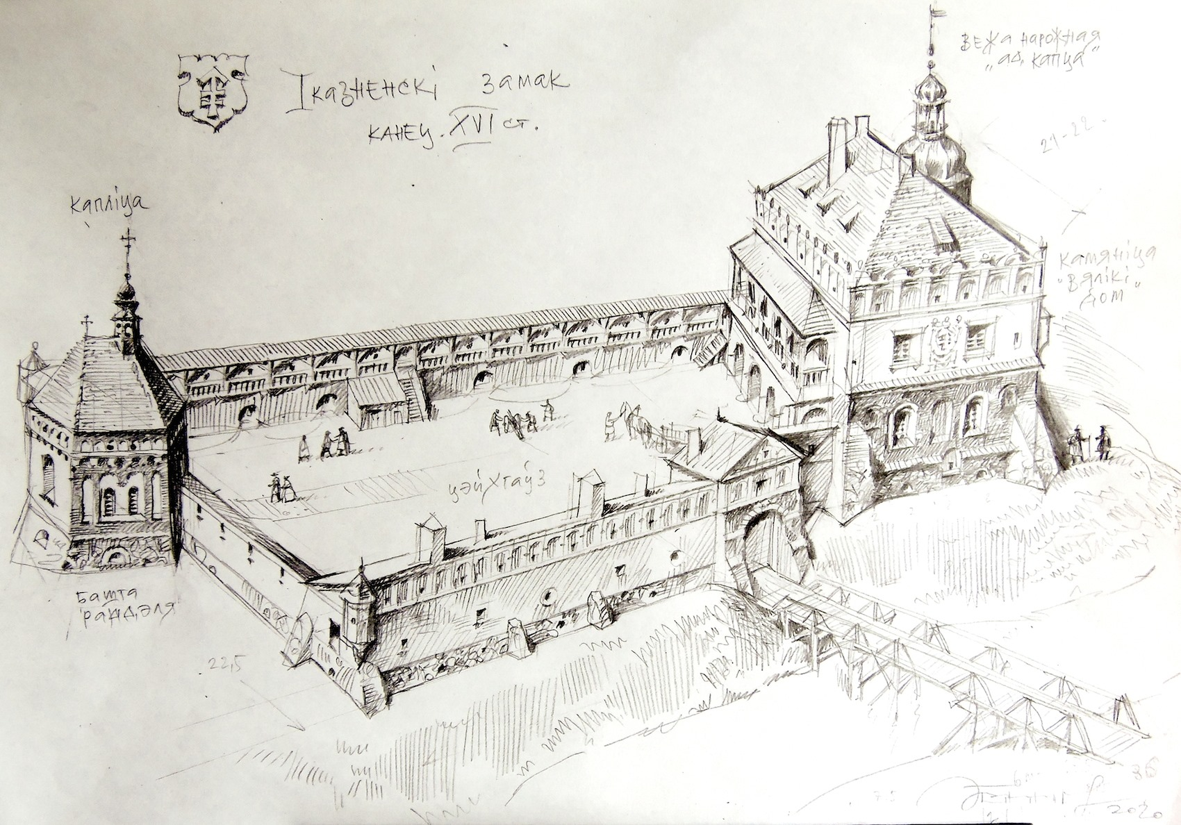 Замак Іказнь, Замак. 1590-я. Перабудова Льва Сапегі. Мастацкая рэканструкцыя П. Татарнікава па натхняльнай прапанове Алеся Краўцэвіча і матэрыялах М. Ткачова і М. Волкава.